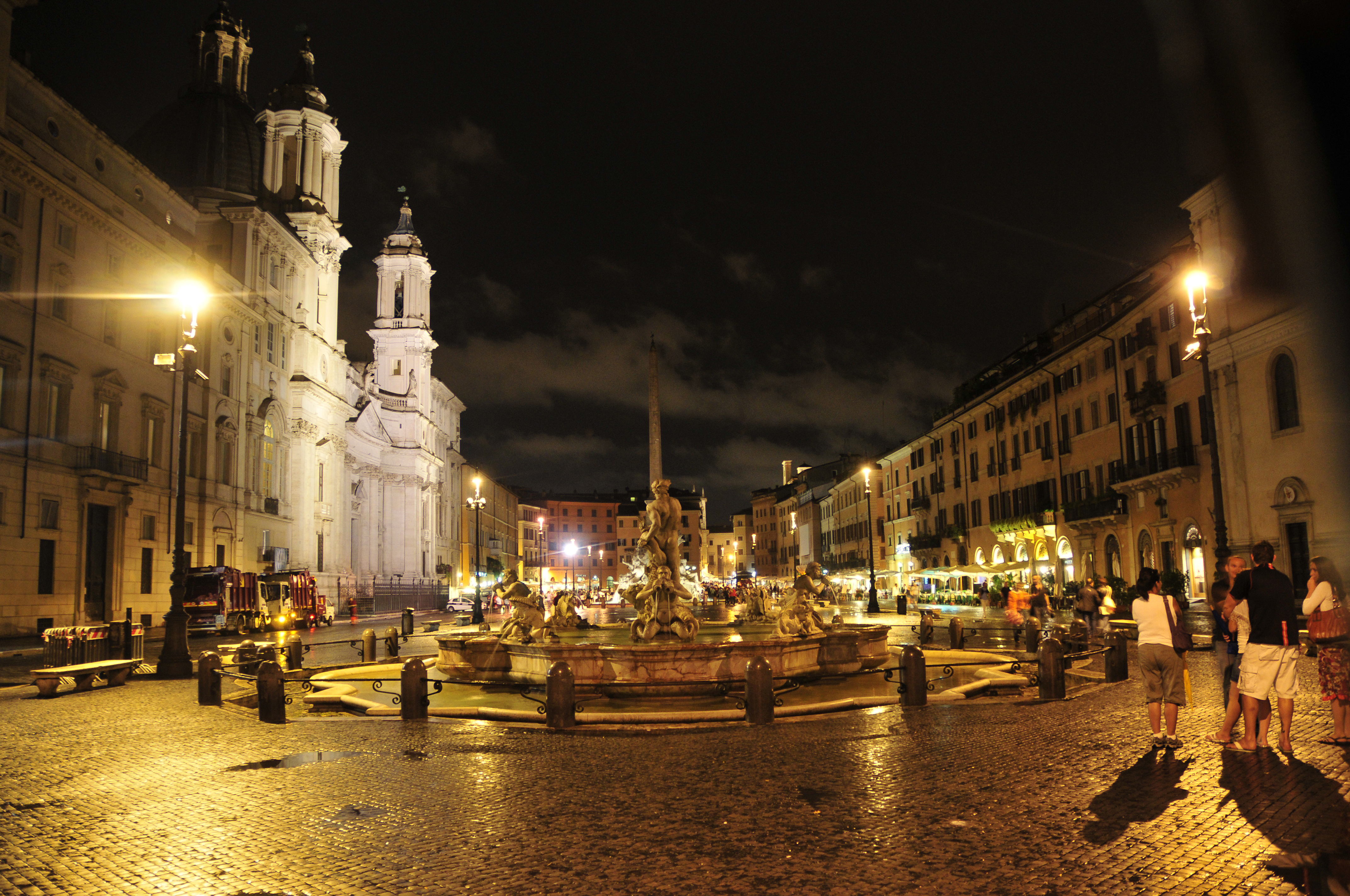 piazza navona, rome august 2010